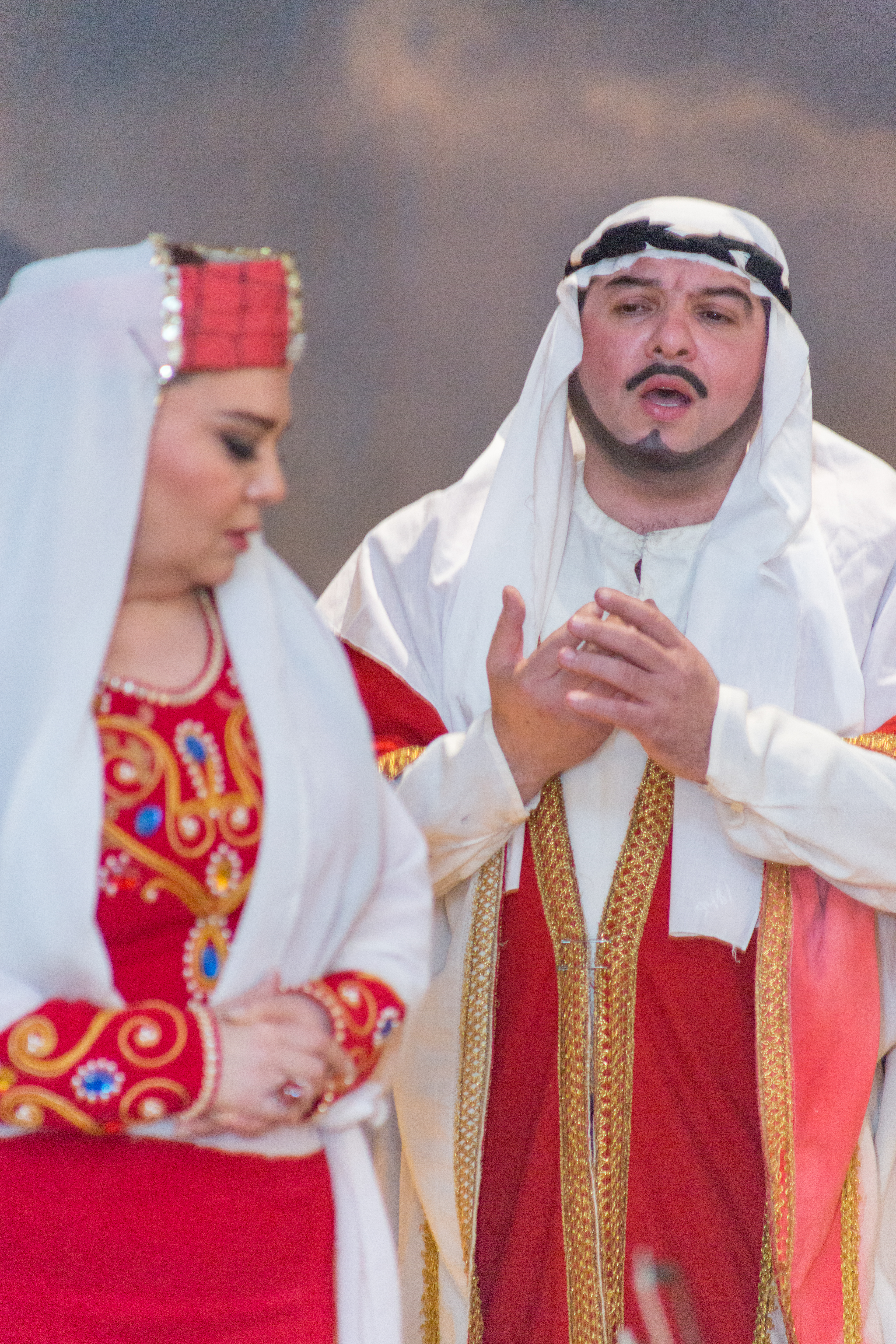 Baku opera and ballet theatre, Leyli and Majnun